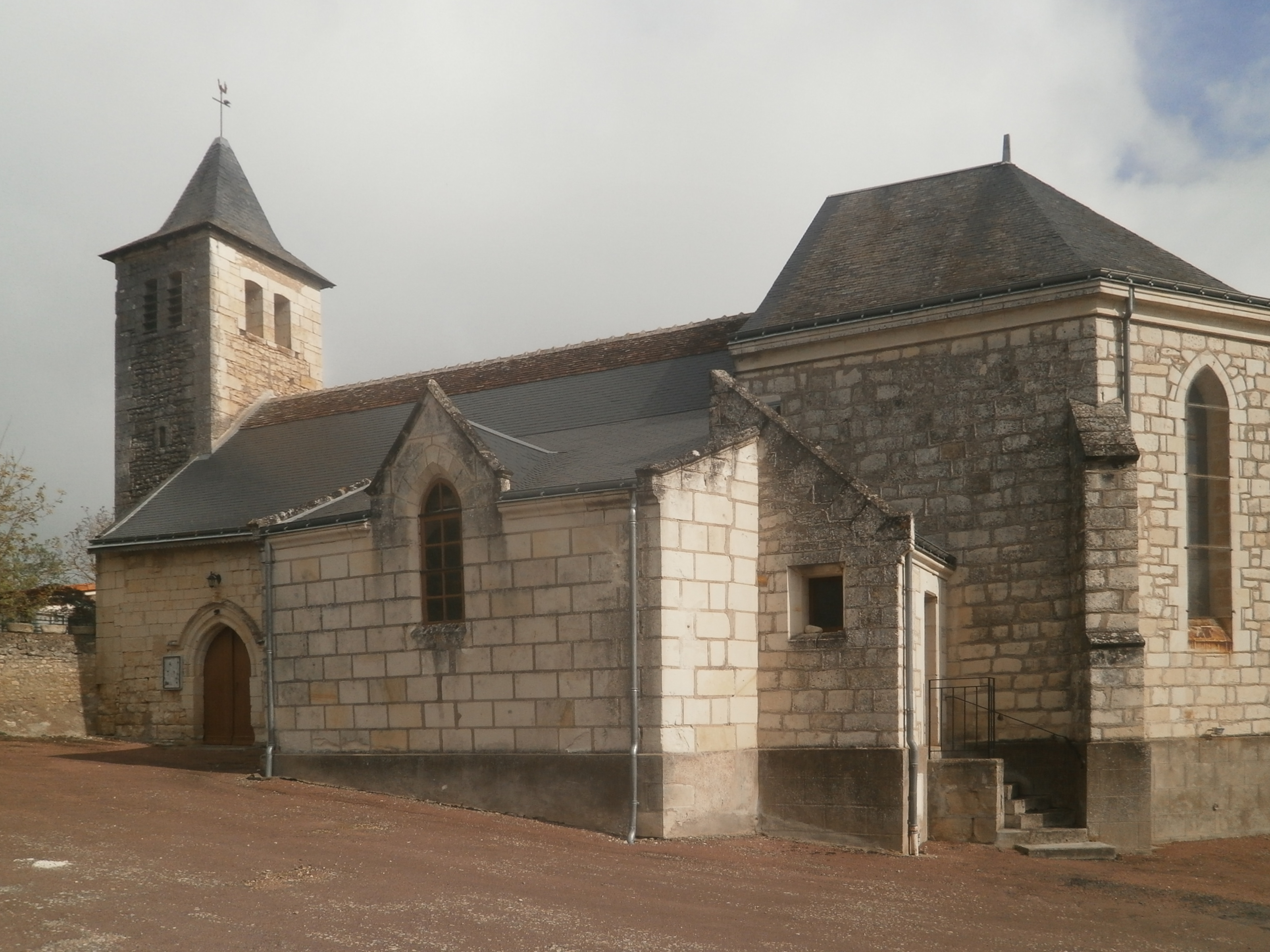 L'église de Theneuil (37 - France)